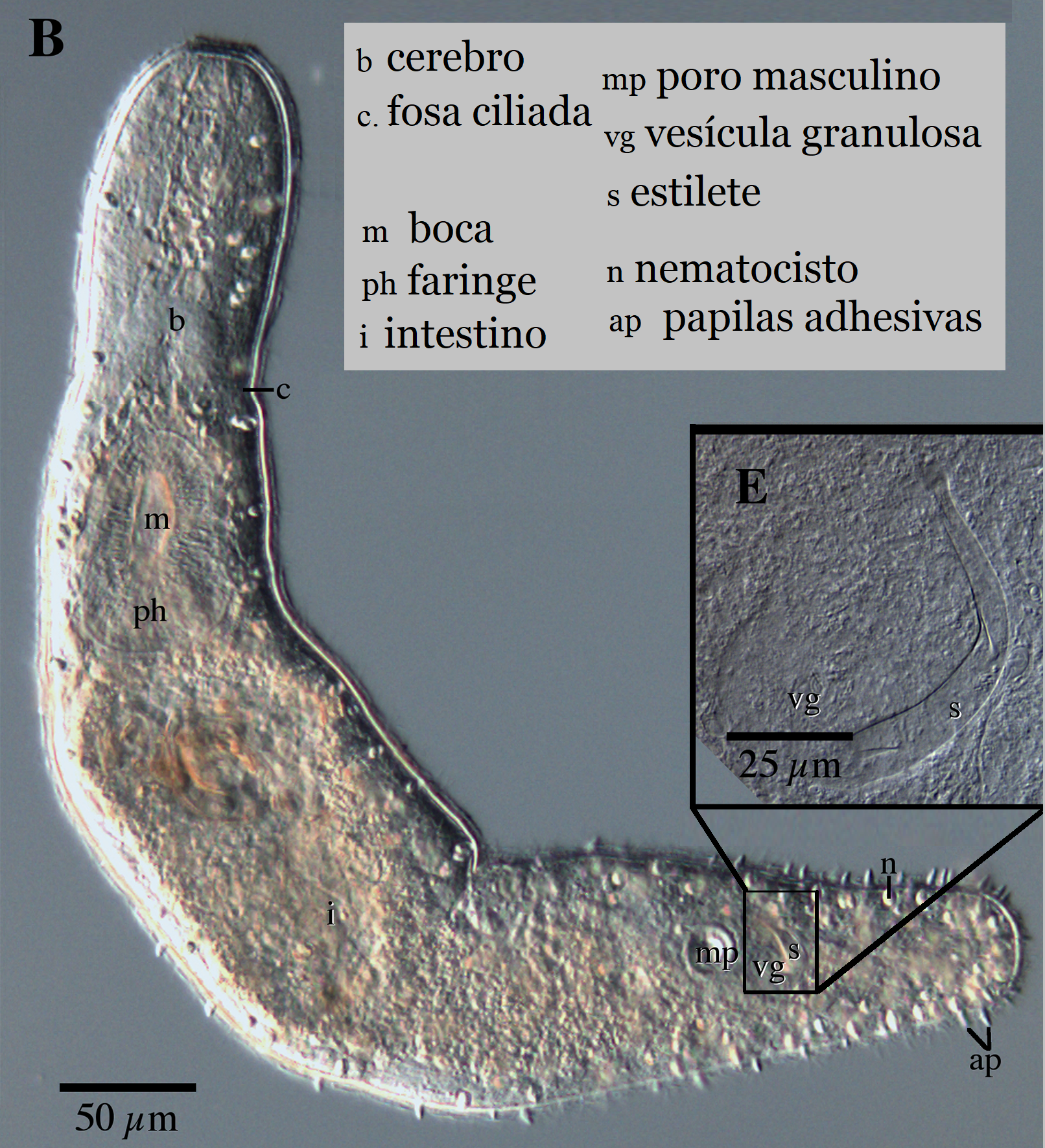 Microstomum marisrubri. Características corporales.